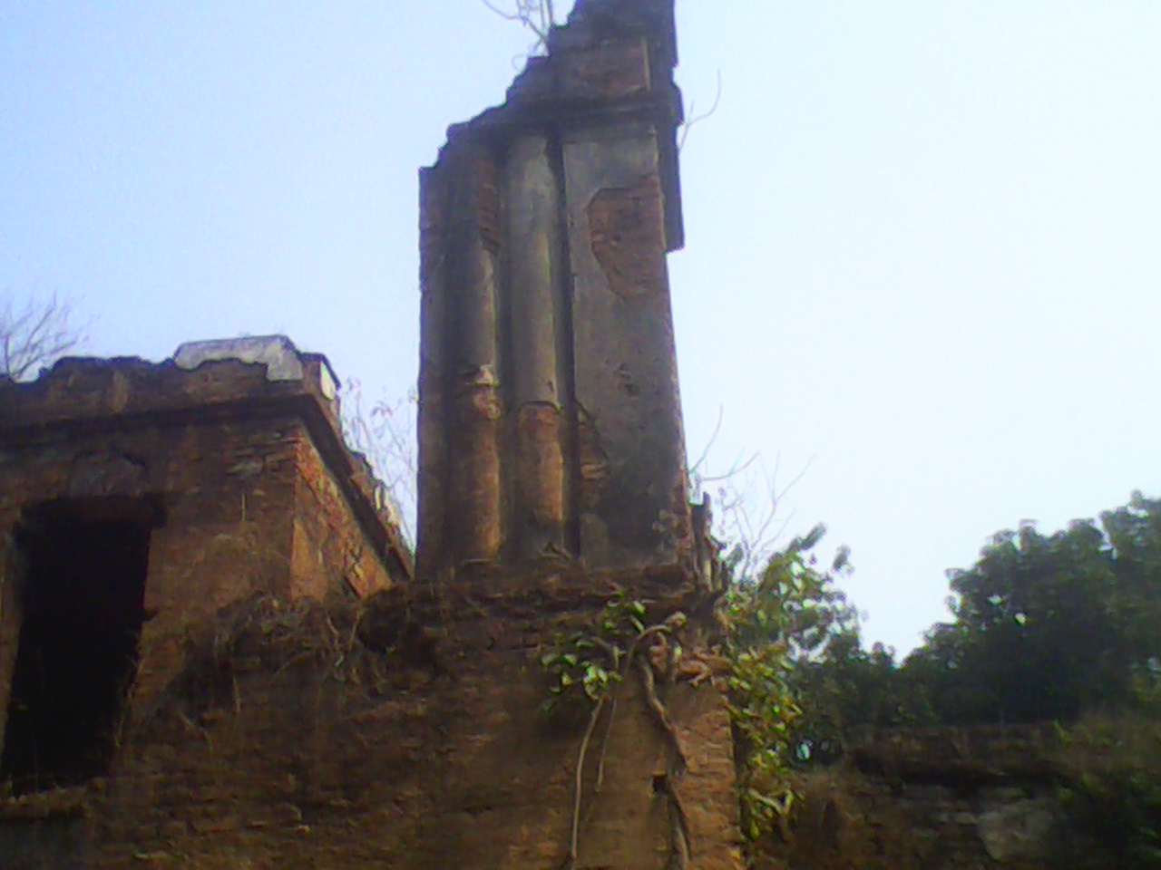 ভাটপাড়া নীলকুঠি